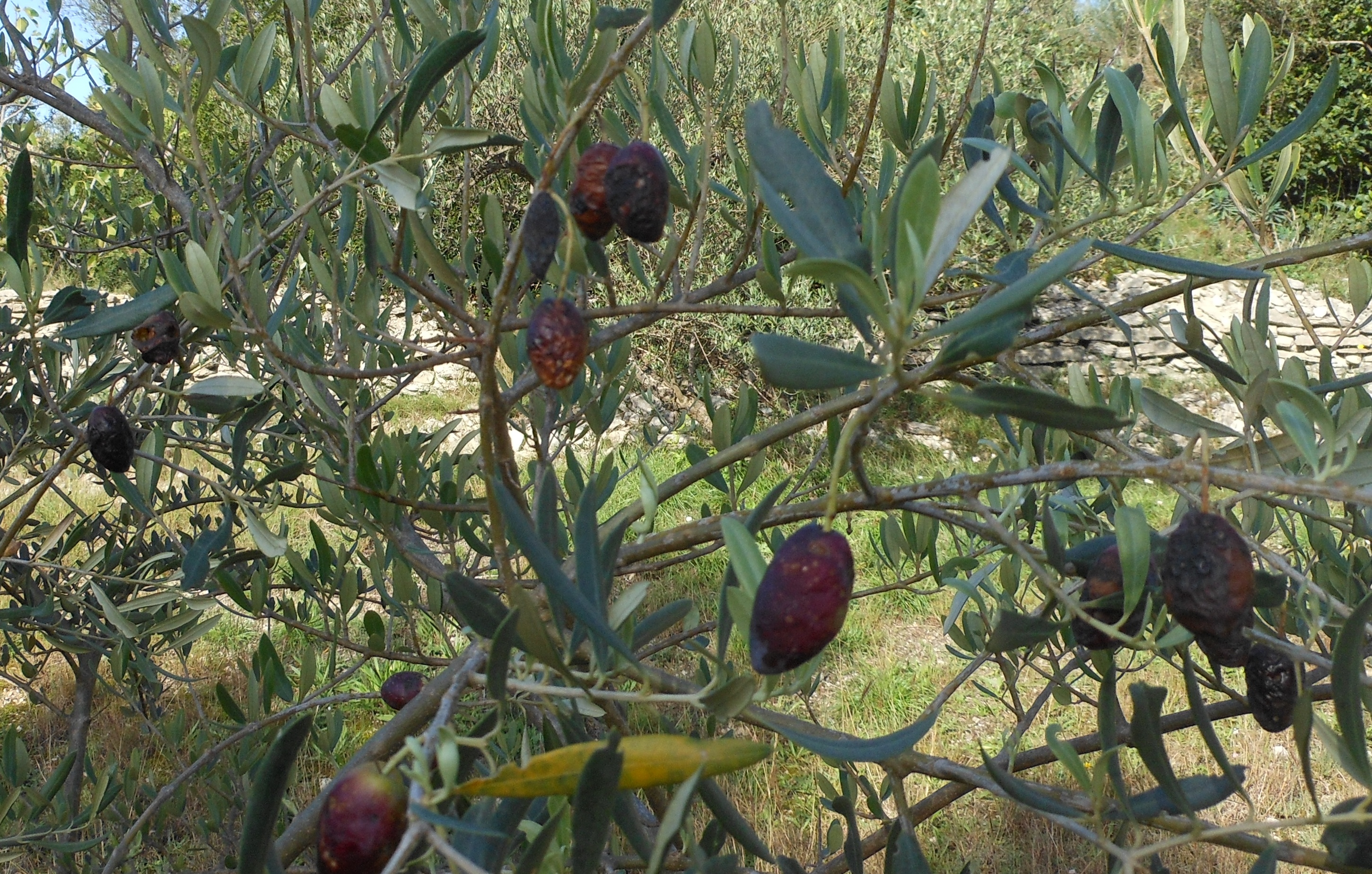 Picholines olives hit by dalmaticosis (Camarosporum dalmaticum) in Claret (dept. Hérault, France)